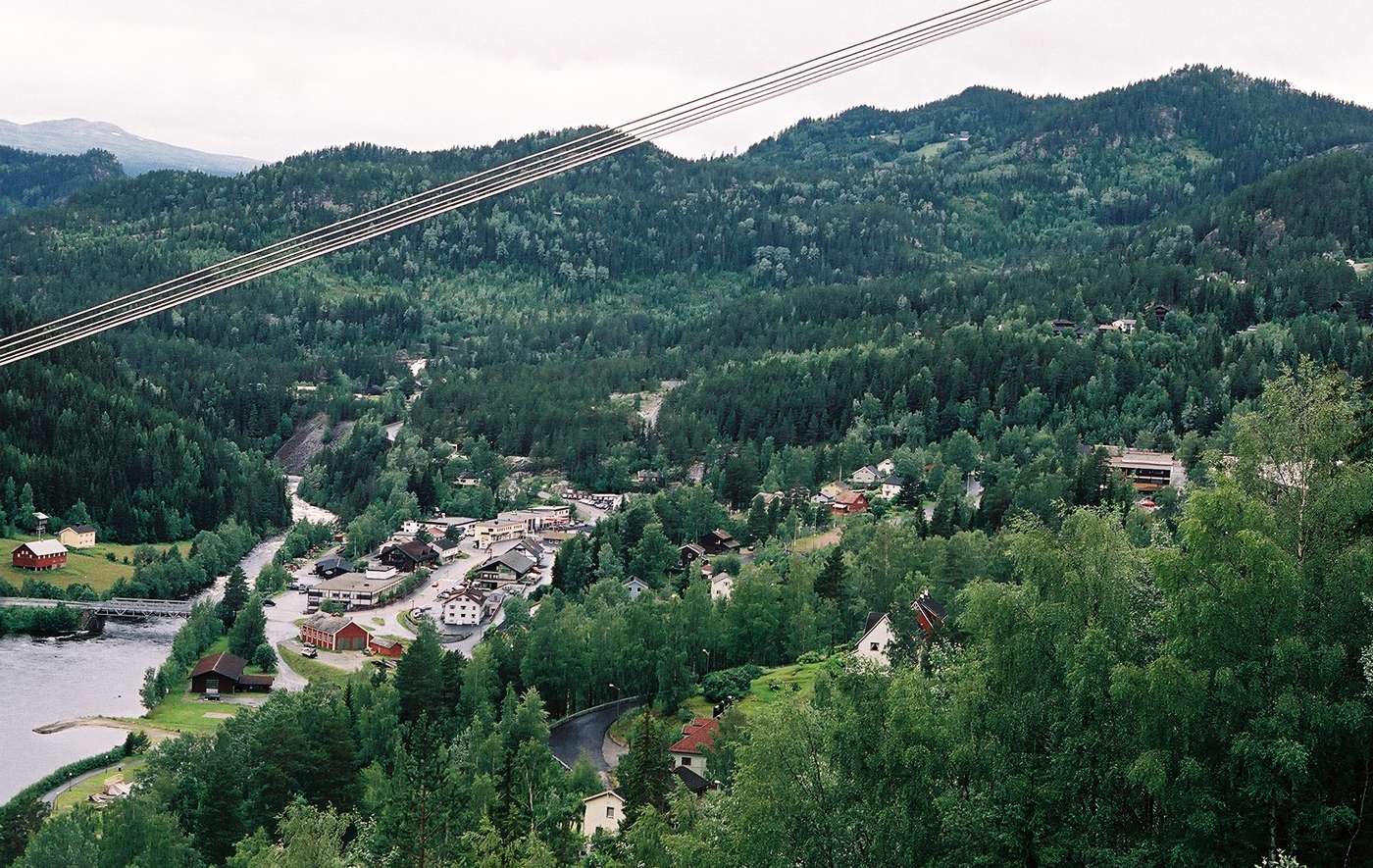 Rødberg, Nore og Uvdal, Norway.